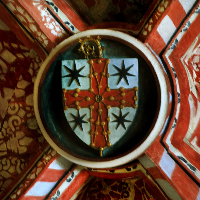 escudo